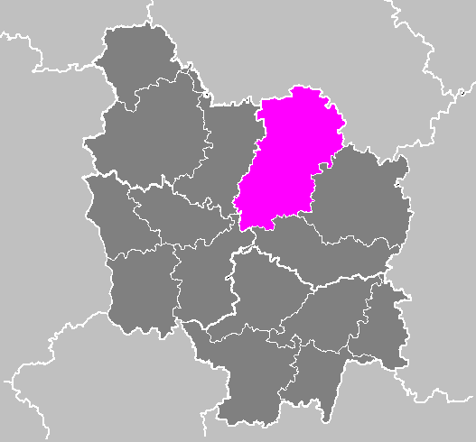 Maps of arrondissements and cantons of France: Arrondissement de Montbard.PNG (Région Bourgogne)